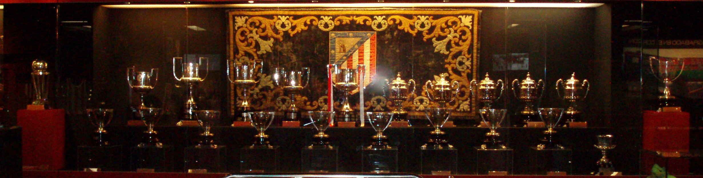 Trofeos en el museo del Club Atlético de Madrid.